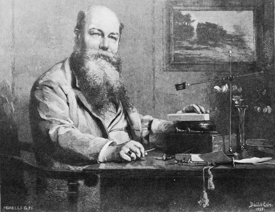 Morelli Gusztáv. Balló Ede festménye (1897) alapján metszette Morelli Gusztáv